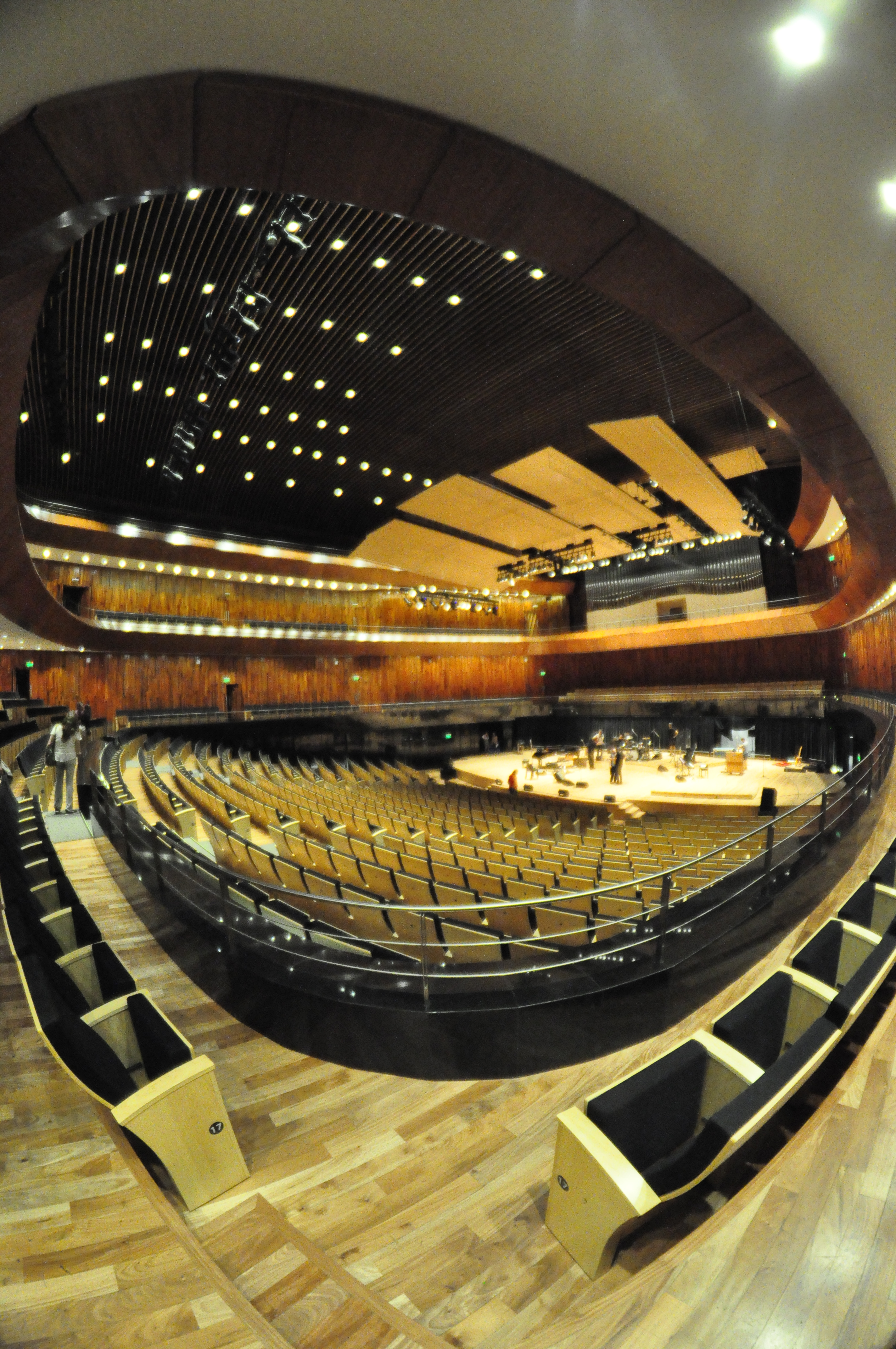 Sitio: CCK - Ex Correo Central